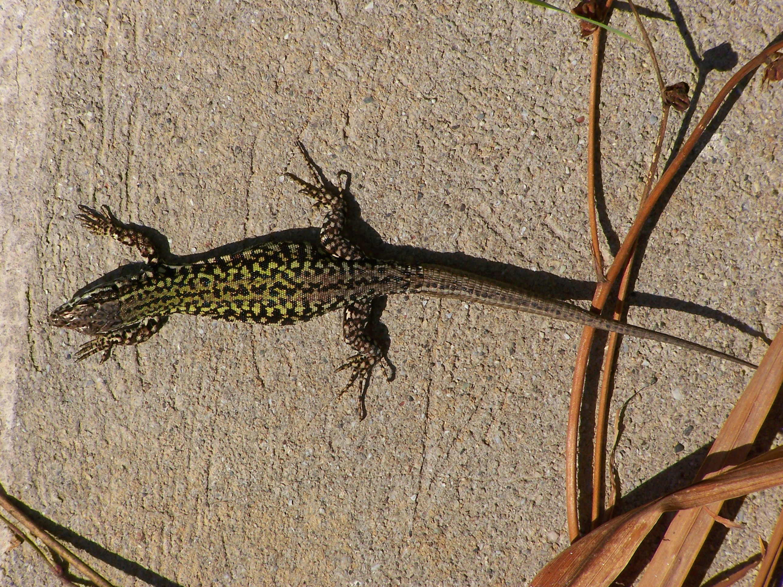 Jaszczurka murowa (Podarcis muralis).